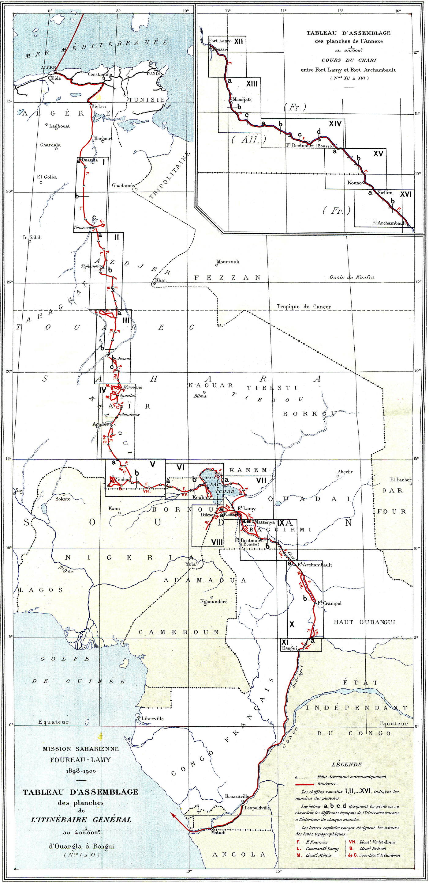 Mission Foureau-Lamy : tableau d'assemblage des planches de l'itinéraire général.